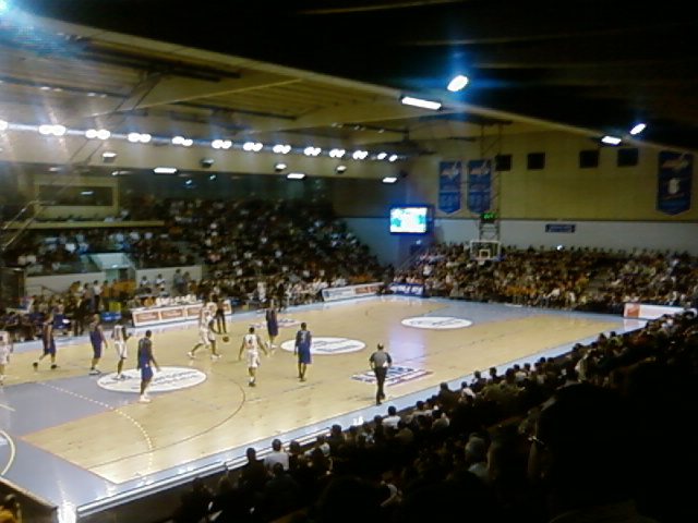 Salle Saint Eloi lors d'un match du Poitiers Basket